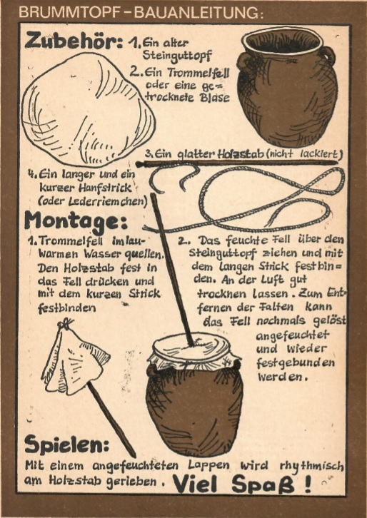 Bauanleitung des Instruments Brummtopf